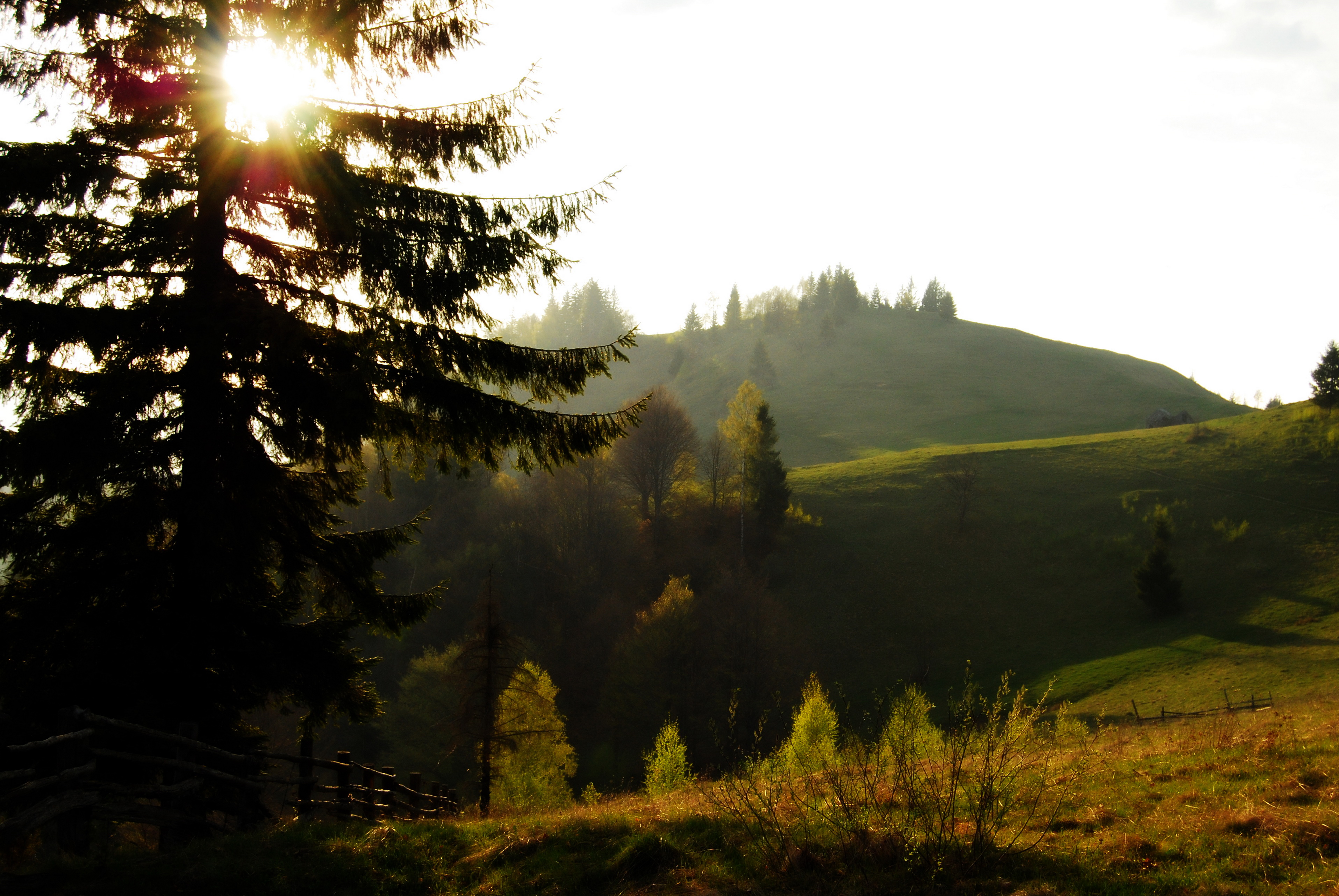 Kosivs'kyi district, Ivano-Frankivs'ka oblast, Ukraine